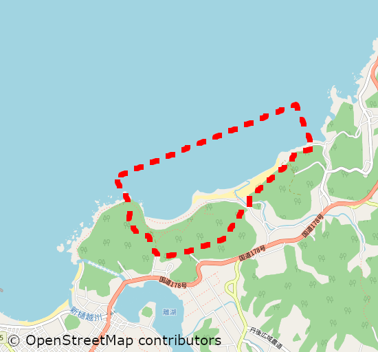 国指定天然記念物及び名勝である琴引浜の指定範囲